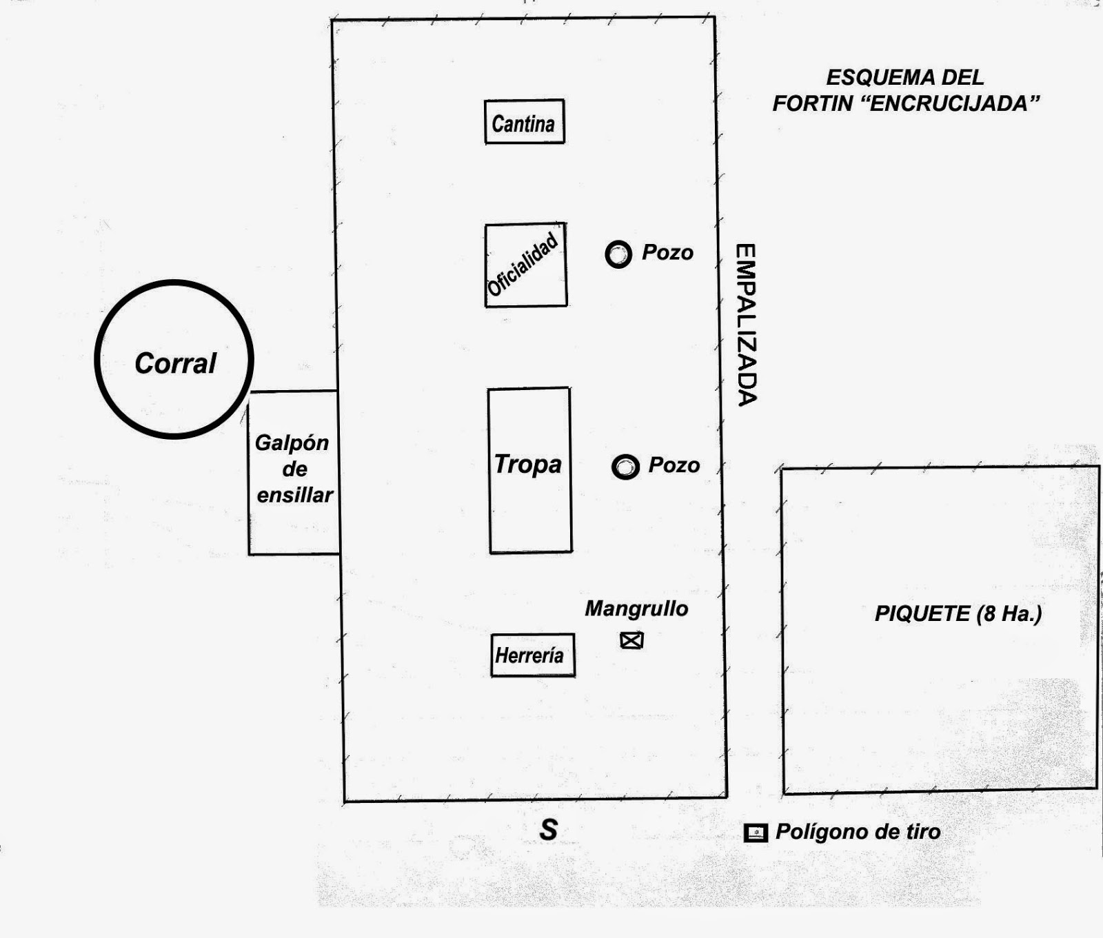 Fortin Encrucijada